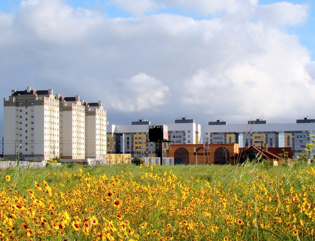 Edifícios no município de Pinhais (Paraná, Sul do Brasil) na fronteira com a capital, Curitiba.